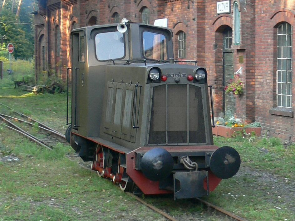 Rudy (Raciborskie): lokomotywa wąskotorowa Wls75